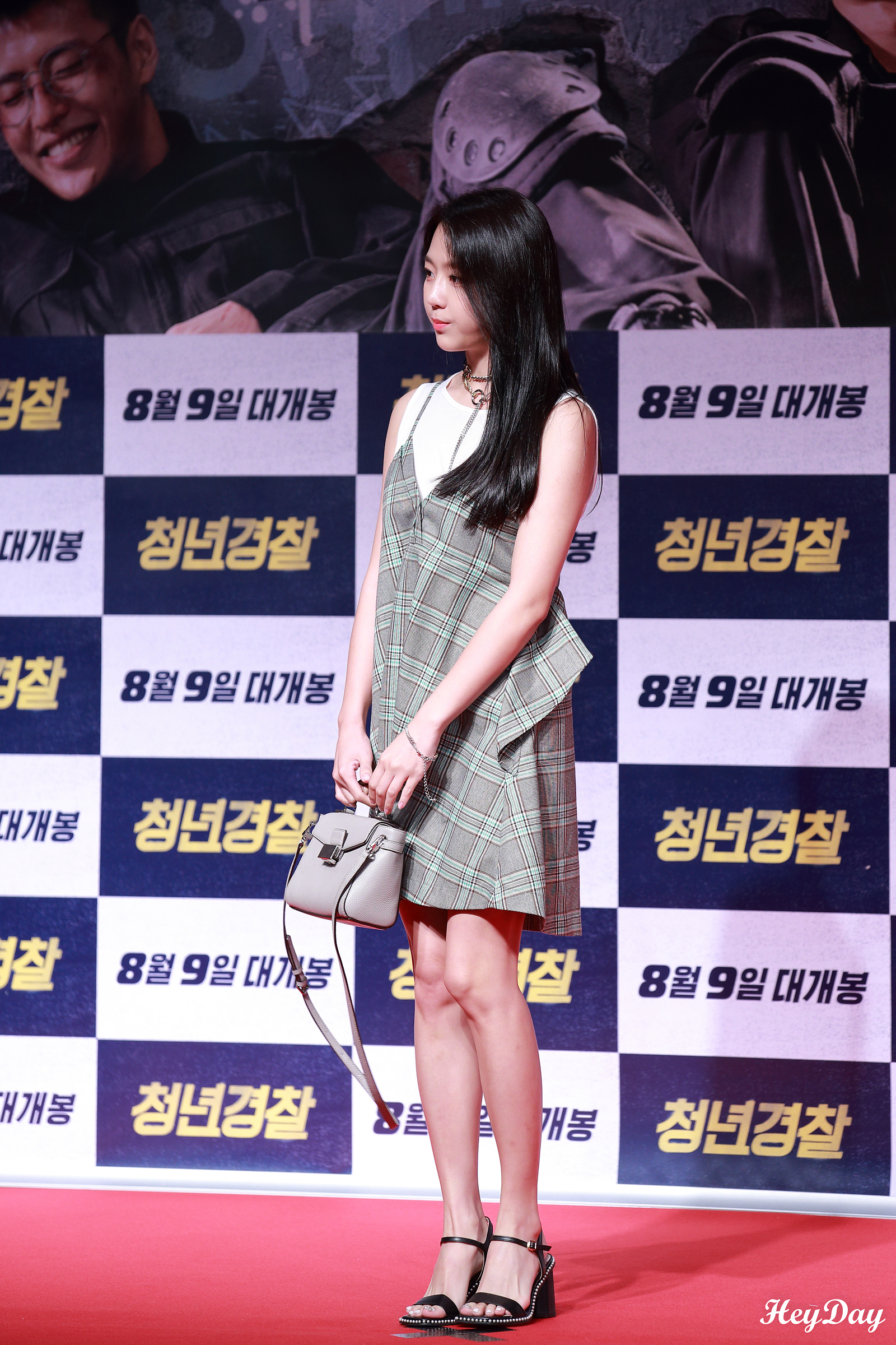 170807 청년경찰 VIP 시사회